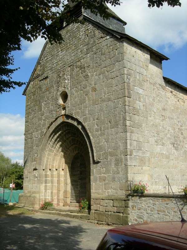 Eglise de Soudaine Lavinadière